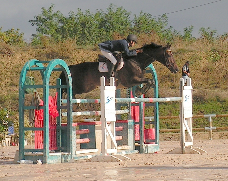 Concours de saut d'obstacle à Niort (France)